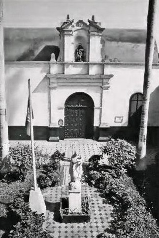 Real Hospital de San Andrés 1